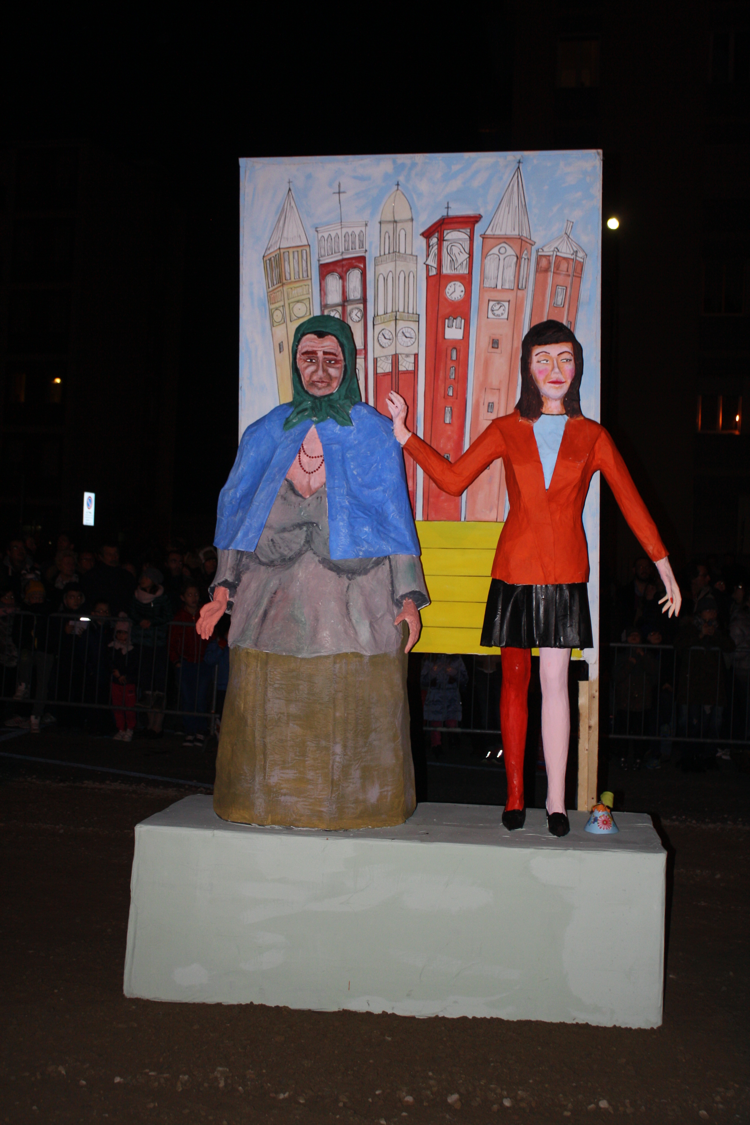 La giöbia de La Famiglia Bustocca bruciata giovedì 29 gennaio 2015 a Busto Arsizio, durante l'anno dei festeggiamenti per i 150 anni dall'elevazione di Busto Arsizio a Città.